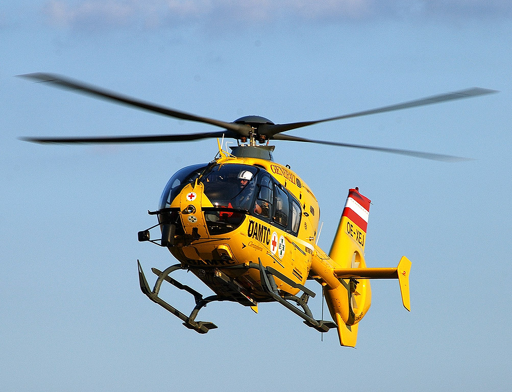 Christophorus 12 (OE-XEJ) air ambulance from Graz landing at the helipad of Christophorus 3 (OE-XEN) in Wiener Neustadt. Der Rettungshubschrauber Christophorus 12 (OE-XEJ) landet am Landeplatz von Christophorus 3 (OE-XEN) in Wiener Neustadt.OE-XEJ